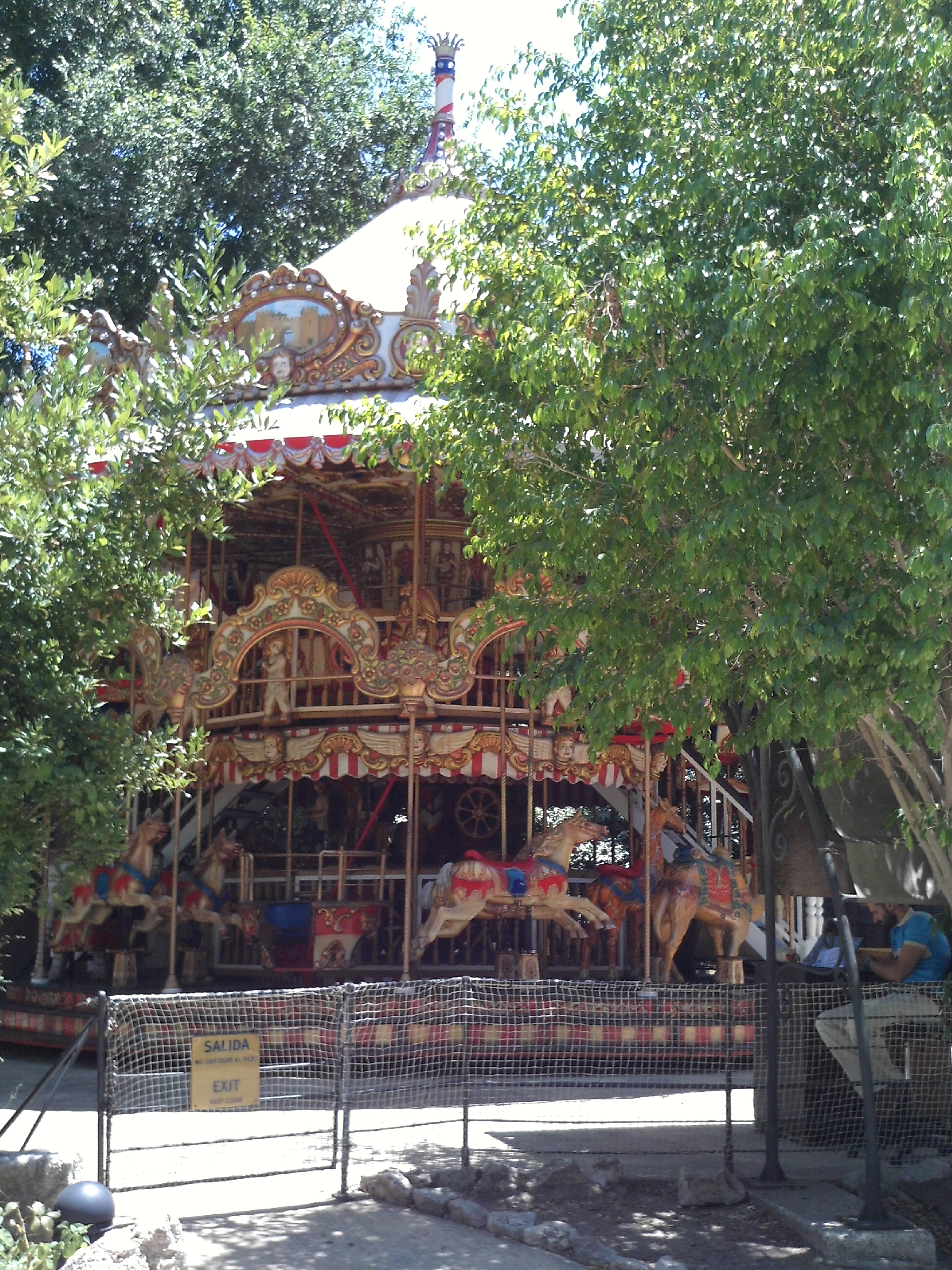 Tiovivo de Isla Mágica que ya estuvo en la Expo del 92